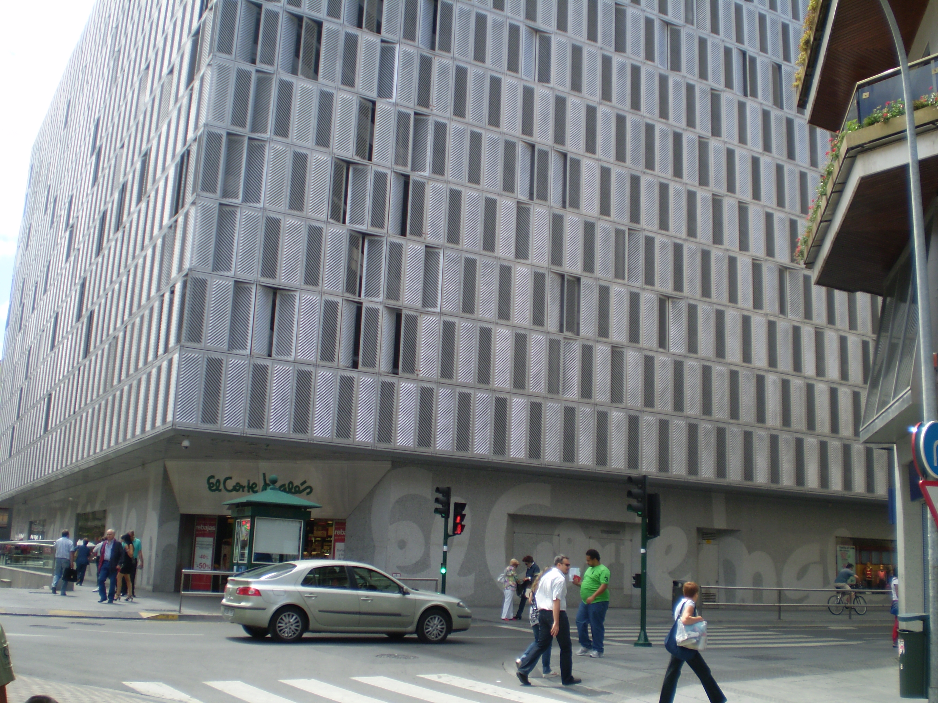 Edificio de unos Grandes Almacenes en Pamplona